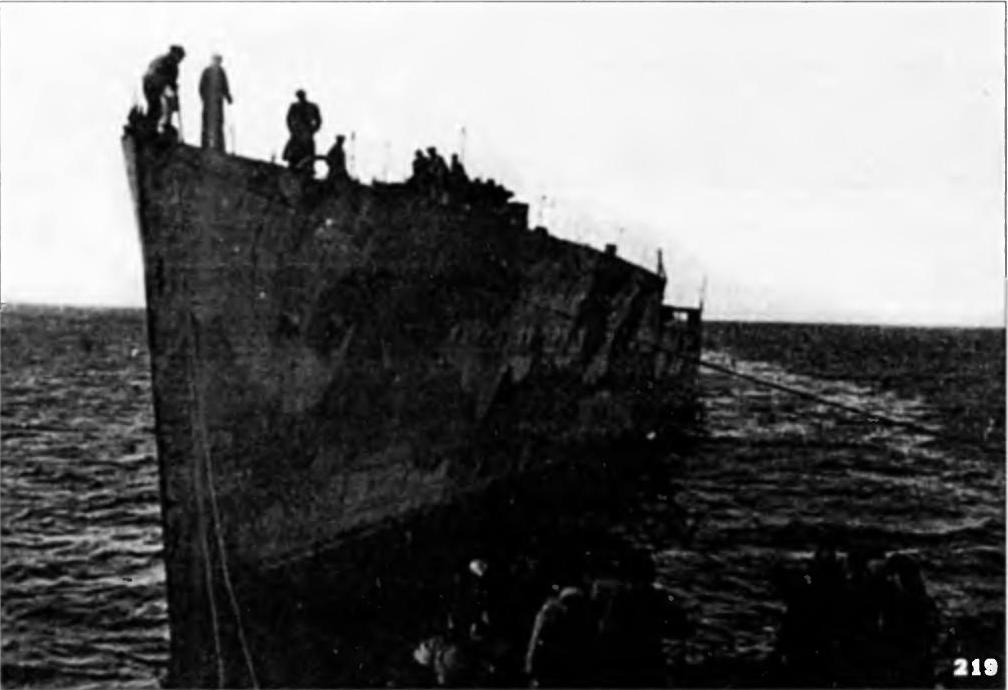 Корпус недостроенного лидера «Ереван» буксируется из Николаева в Севастополь, август 1941.